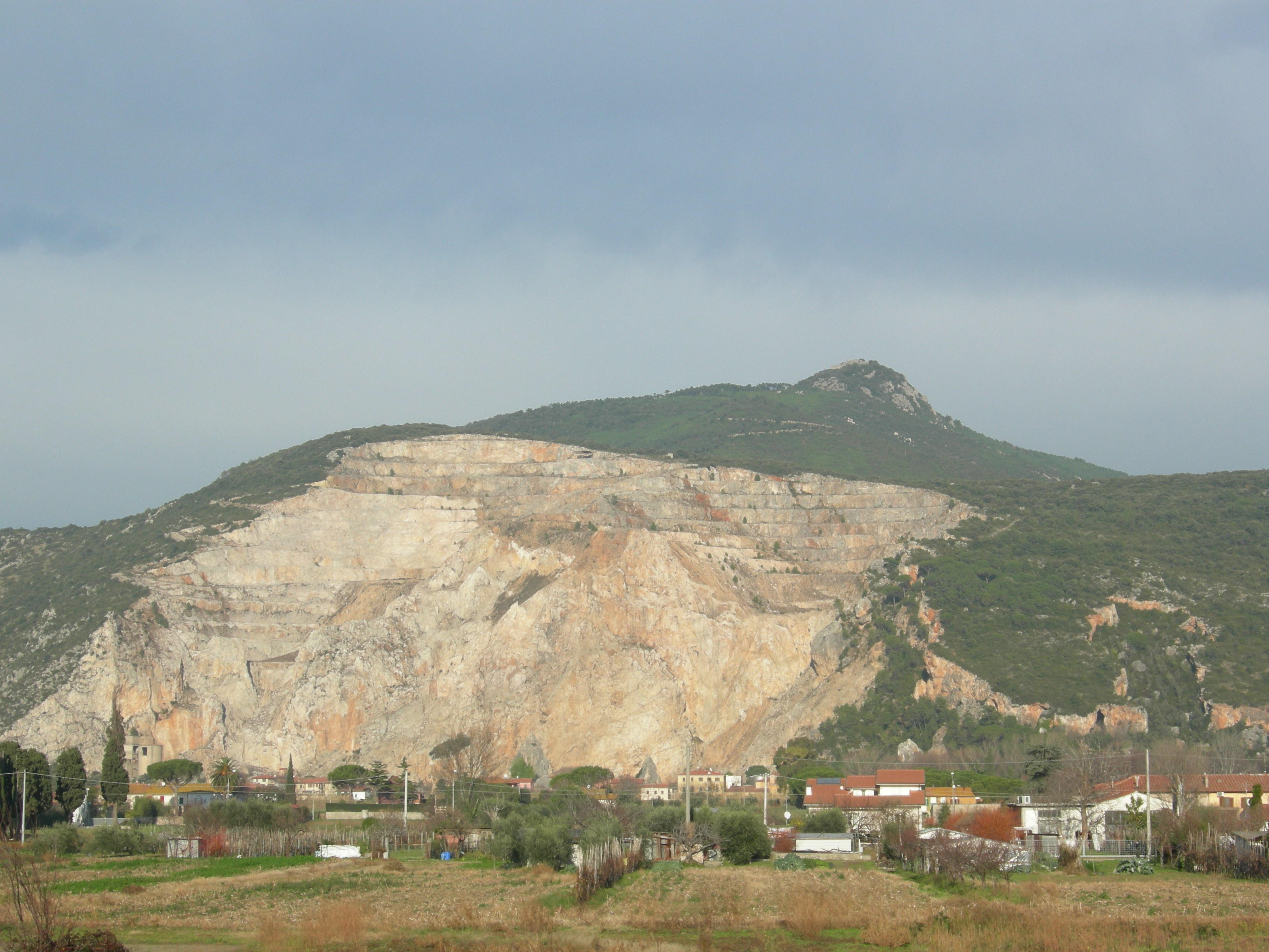 La cava di Caprona. In alto la Verruca